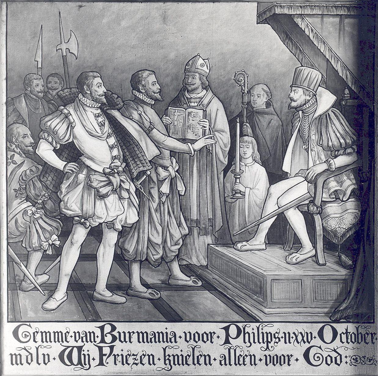 Leeuwarden, Staatensaal: Gemme von Burmania vor Philipp II., 25. Oktober 1555, Wir Friesen knien nur vor Gott.